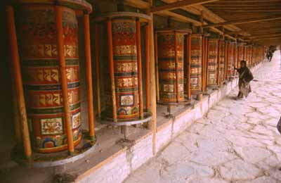 Gebetsmühlen-Umgang am Kloster Labrang in Amdo Bildquelle: eigenes Foto (Andreas Gruschke) Foto: Andreas Gruschke (Freiburg)